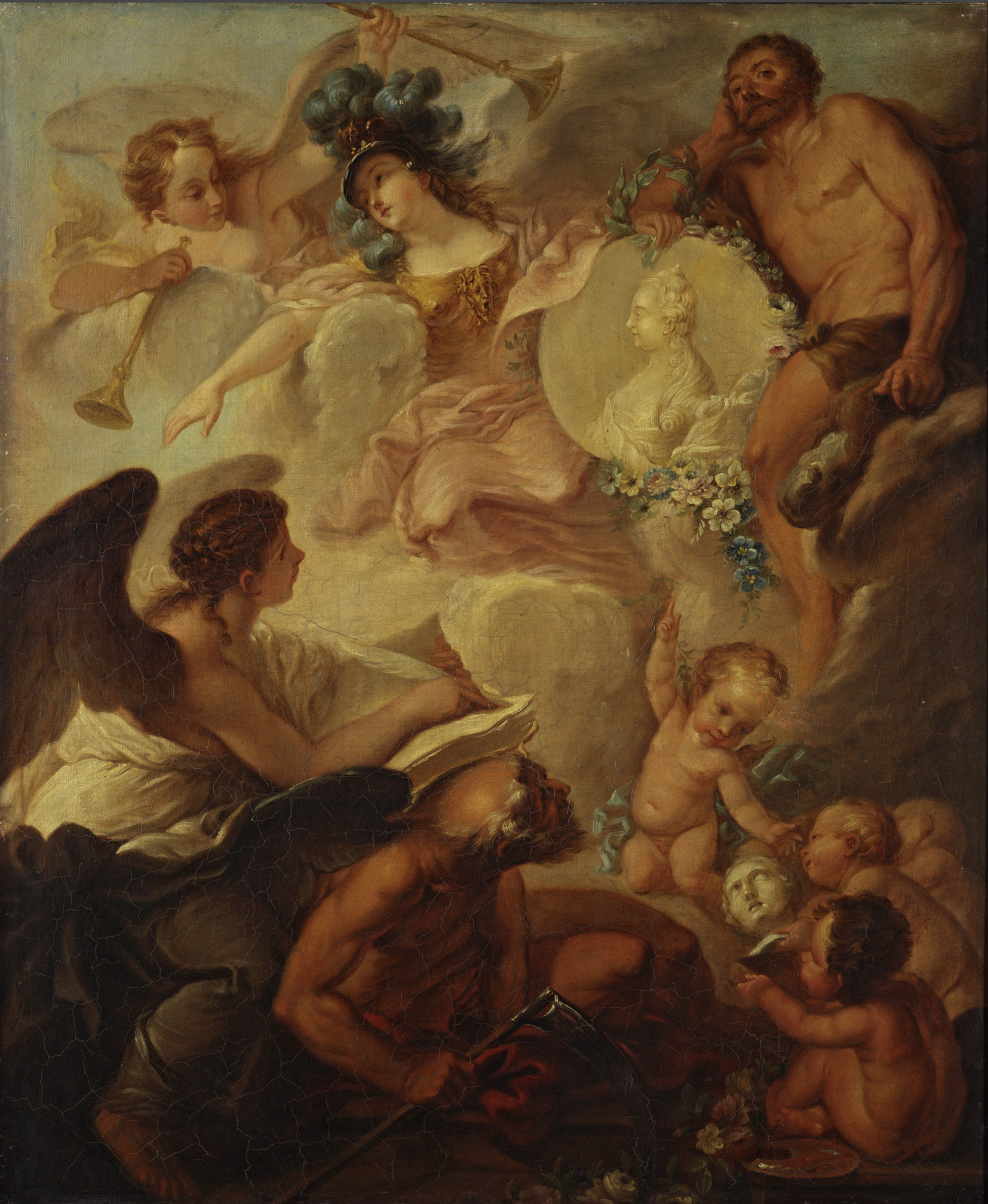 Неизвестный иностранный(?) художник. "Аллегория на основание Академии художеств". Вторая половина 1750-х. Холст, масло. ГТГ. 79,5х66,3. Эта работа представляет собой довольно редкий даже для искусства России XVIII столетия тип живописной аллегории. В ней прославляются деяния императрицы Елизаветы Петровны, медальон с профильным портретом которой держит в руках античная богиня мудрости Минерва. Справа вверху изображен Геркулес с палицей в руке, что служит намеком на воинские победы России в Семилетней войне, которую она вела с 1756 по 1763 годы. Муза истории Клио вписывает в книгу, лежащую на спине Сатурна (или Кроноса, олицетворяющего время), новое великое деяние государыни – основание Императорской Академии трех знатнейших художеств. Фигурки путти с атрибутами трех искусств (палитра, кирпич и скульптурная голова) олицетворяют живопись, архитектуру и скульптуру, а младенец с огнем во лбу – юного гения российских искусств.